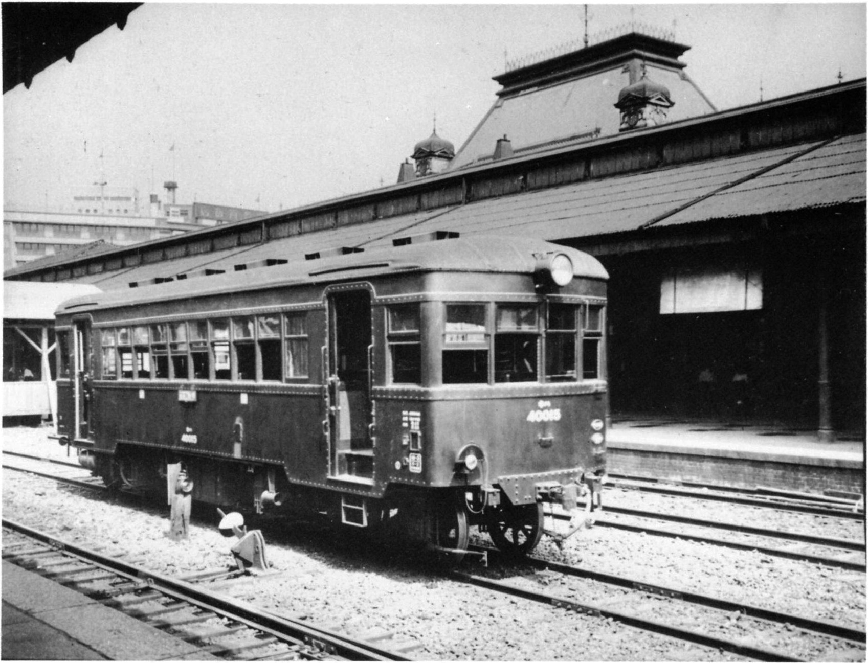 キハ40000形気動車キハ40015、大阪駅にて。背後に二代目大阪駅舎(昭和10年6月から解体)、左に阪急百貨店(梅田阪急ビル)が見える。西成線で使われていた1934年(昭和9年)頃。